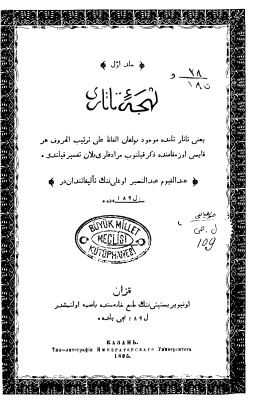 Татарча/tatarça: Беренче төрки аңлатмалы сүзлек